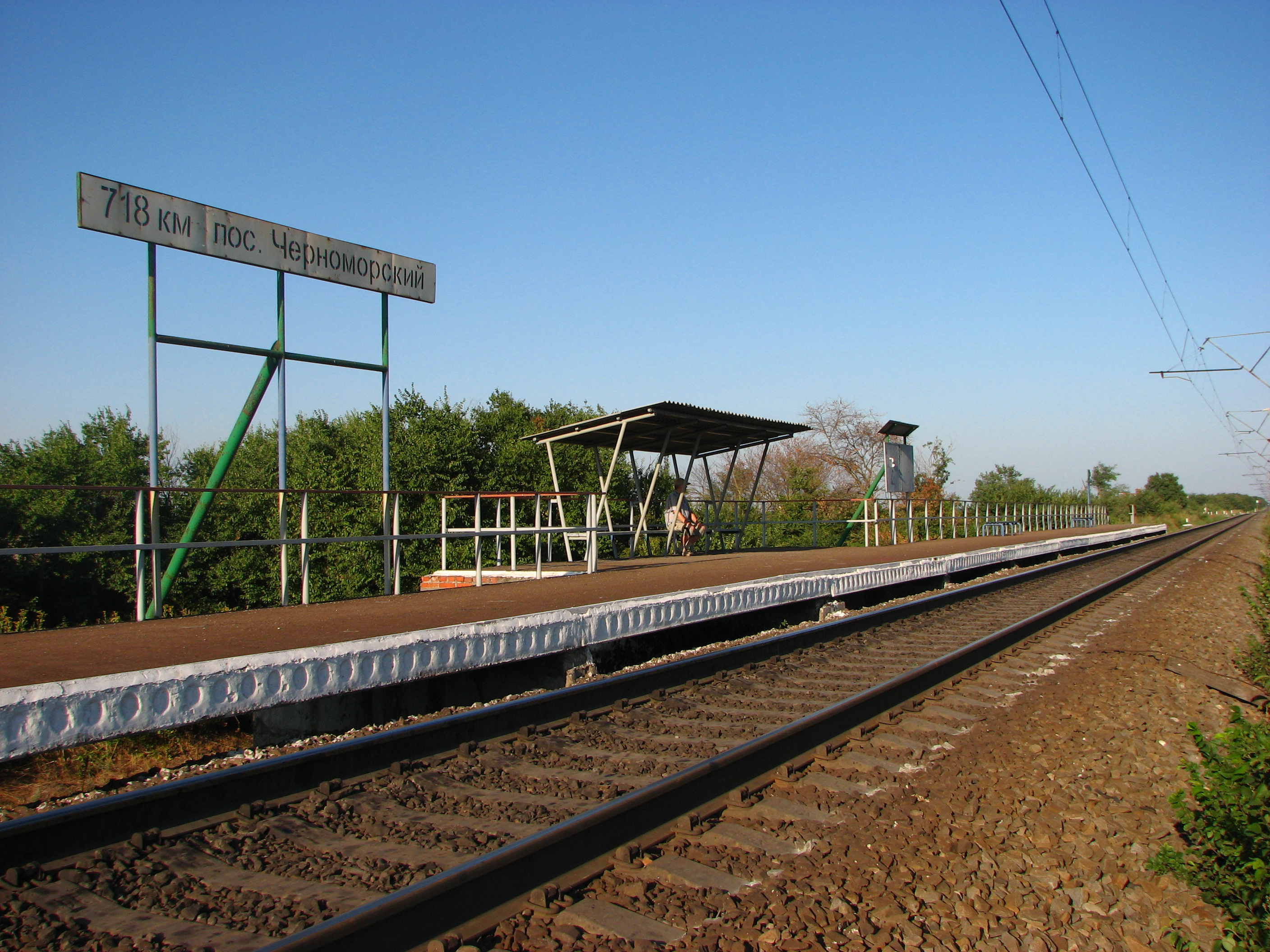 Остановка электропоездов в поселке Черноморском